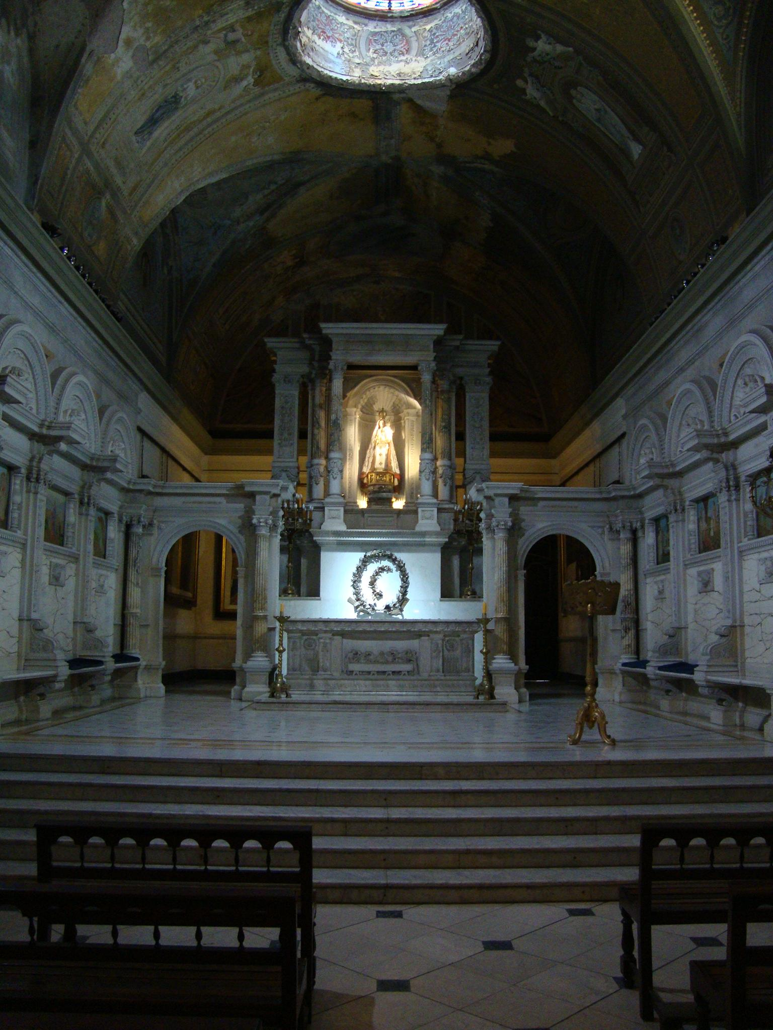 Nave lateral (lado este) de la Basílica de Nuestra Señora del Rosario, en el Convento de Santo Domingo de Buenos Aires, Argentina. Altar de la virgen tras el cual se exhiben las banderas inglesas arrebatadas durante la invasión de 1807.